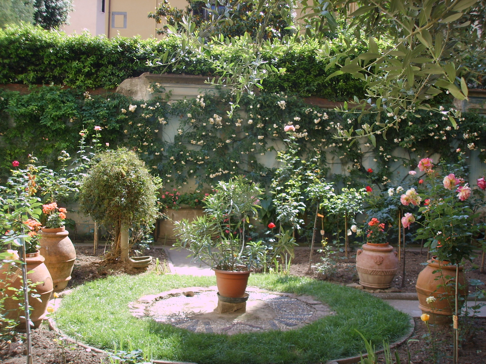 Palazzo dell'antella, giardino